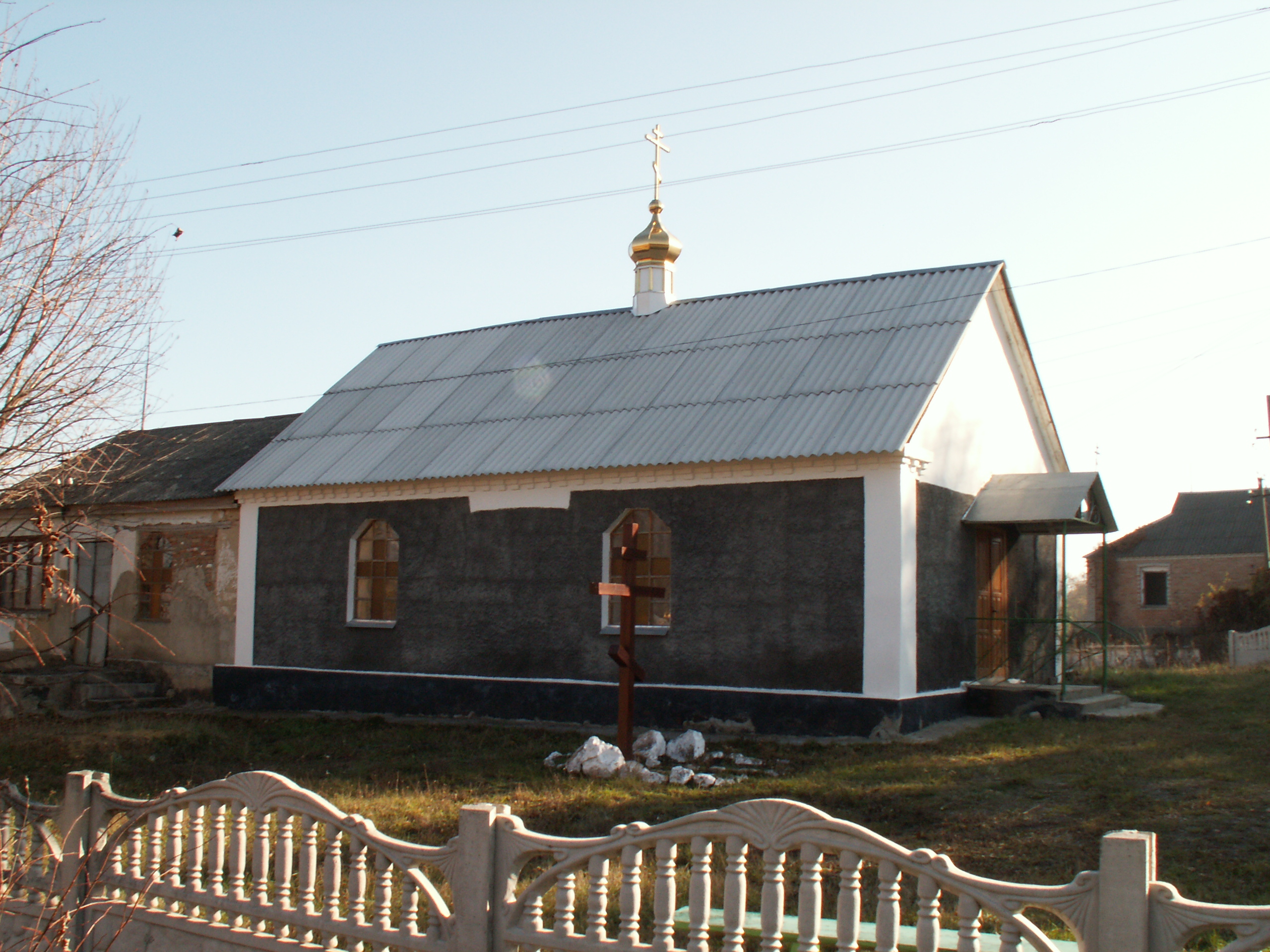 Діюча сільська церква, перебудована з магазину